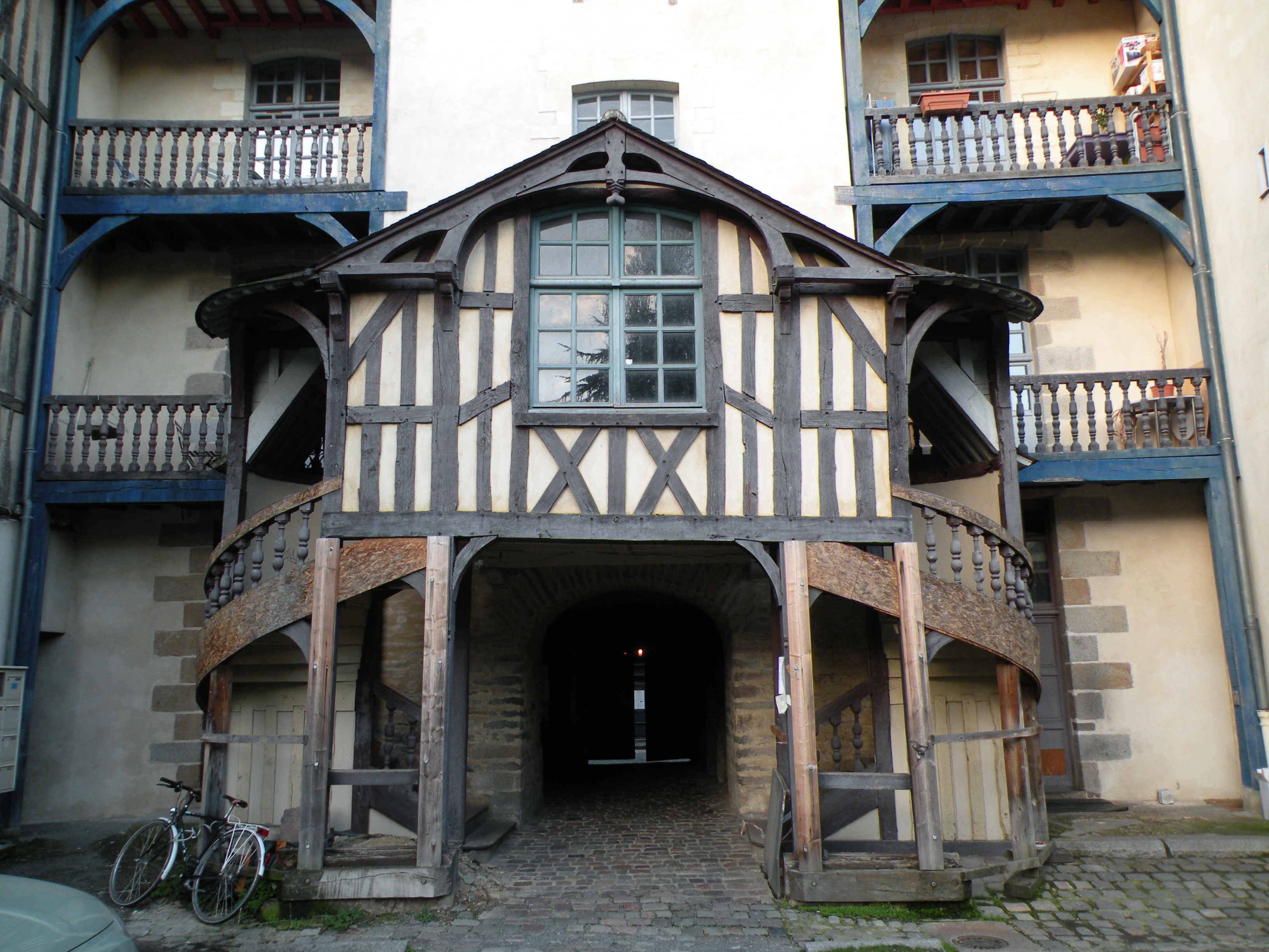 Escalier de la Grande maison des Carmes, 34 rue Vasselot à Rennes.